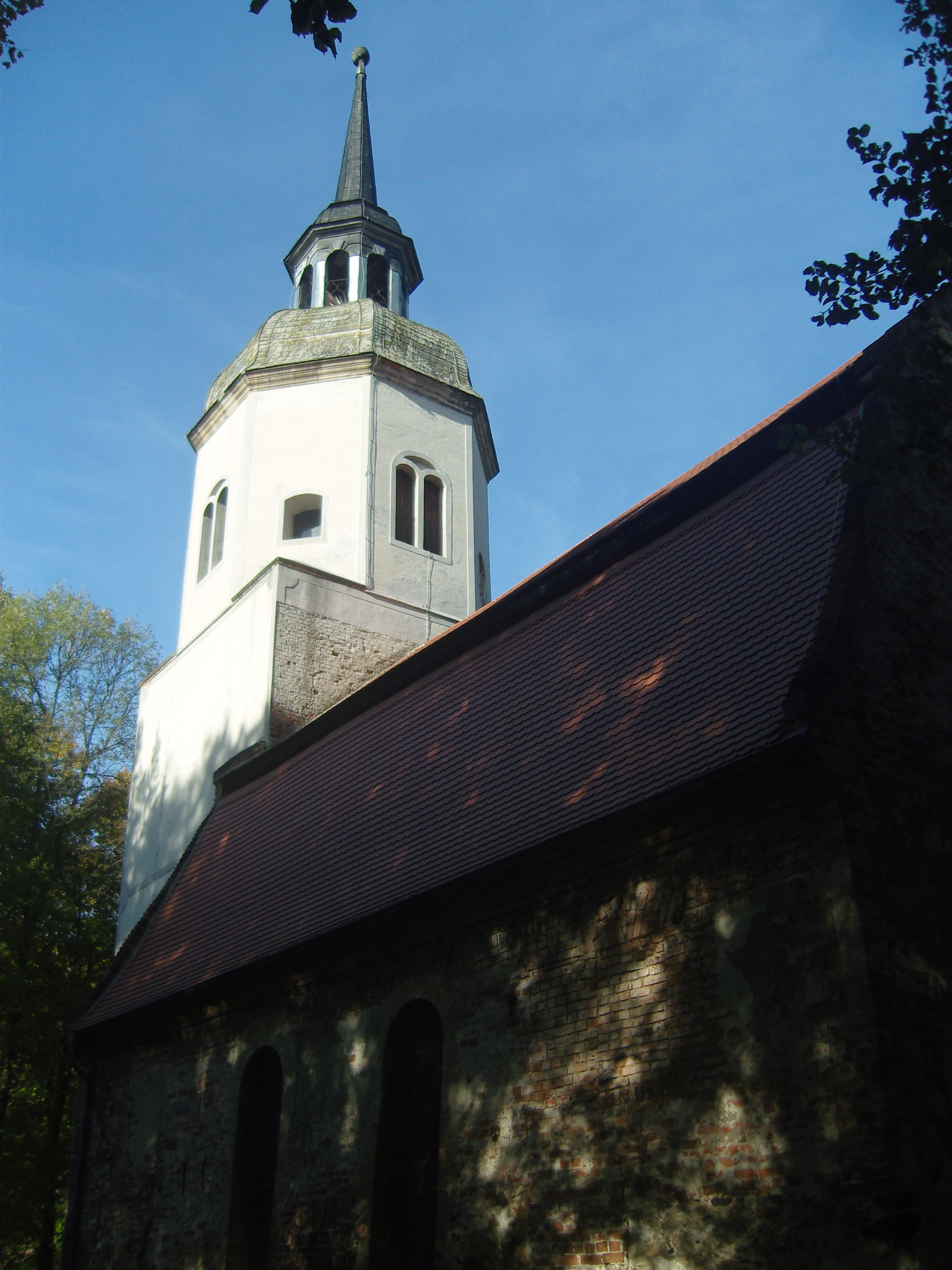 Dorfkiriche Reddern